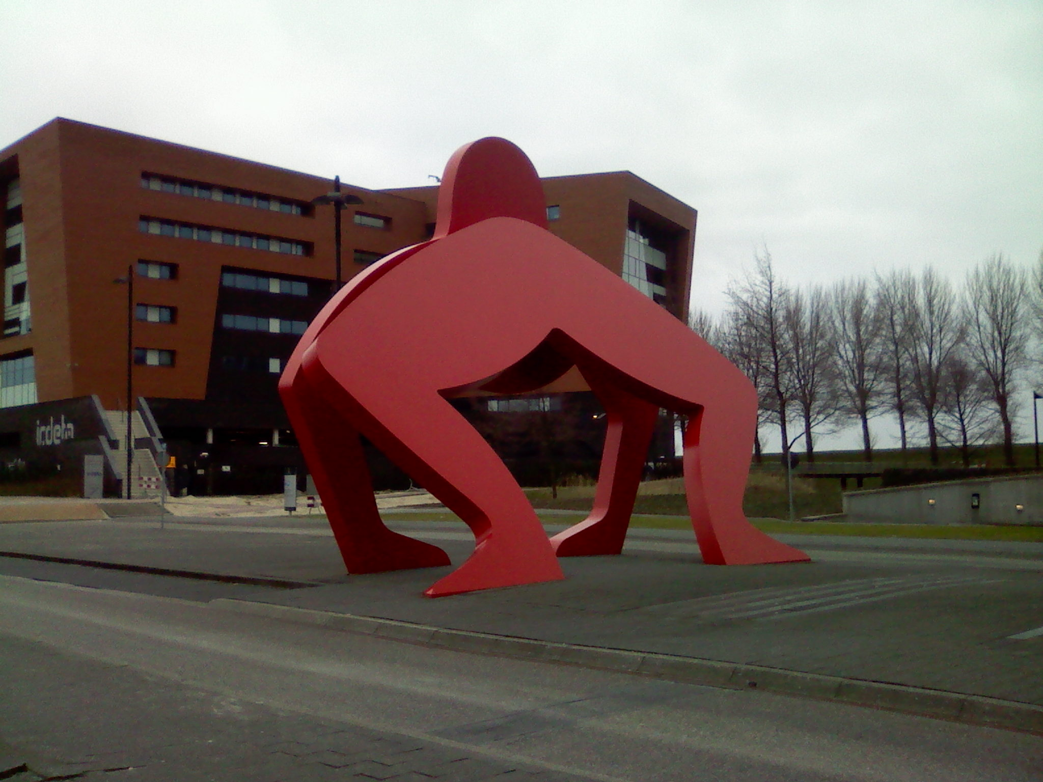 Werk: ; Kunstenaar: Thomas Houseago; Jaar: 2004; Straat: Taurusavenue; Materiaal